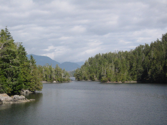 Barkley Sound